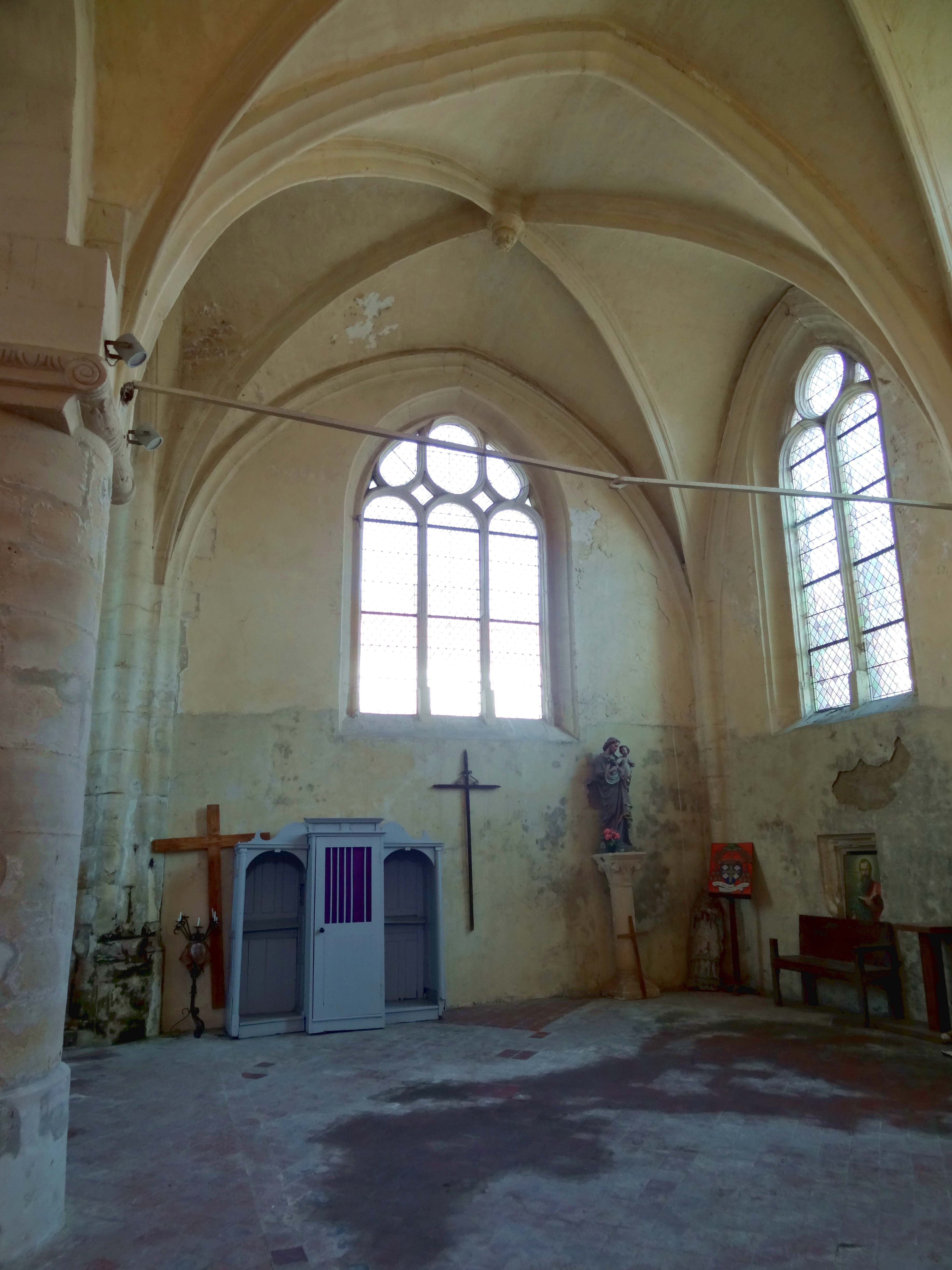 Intérieur de l'église - voir titre.